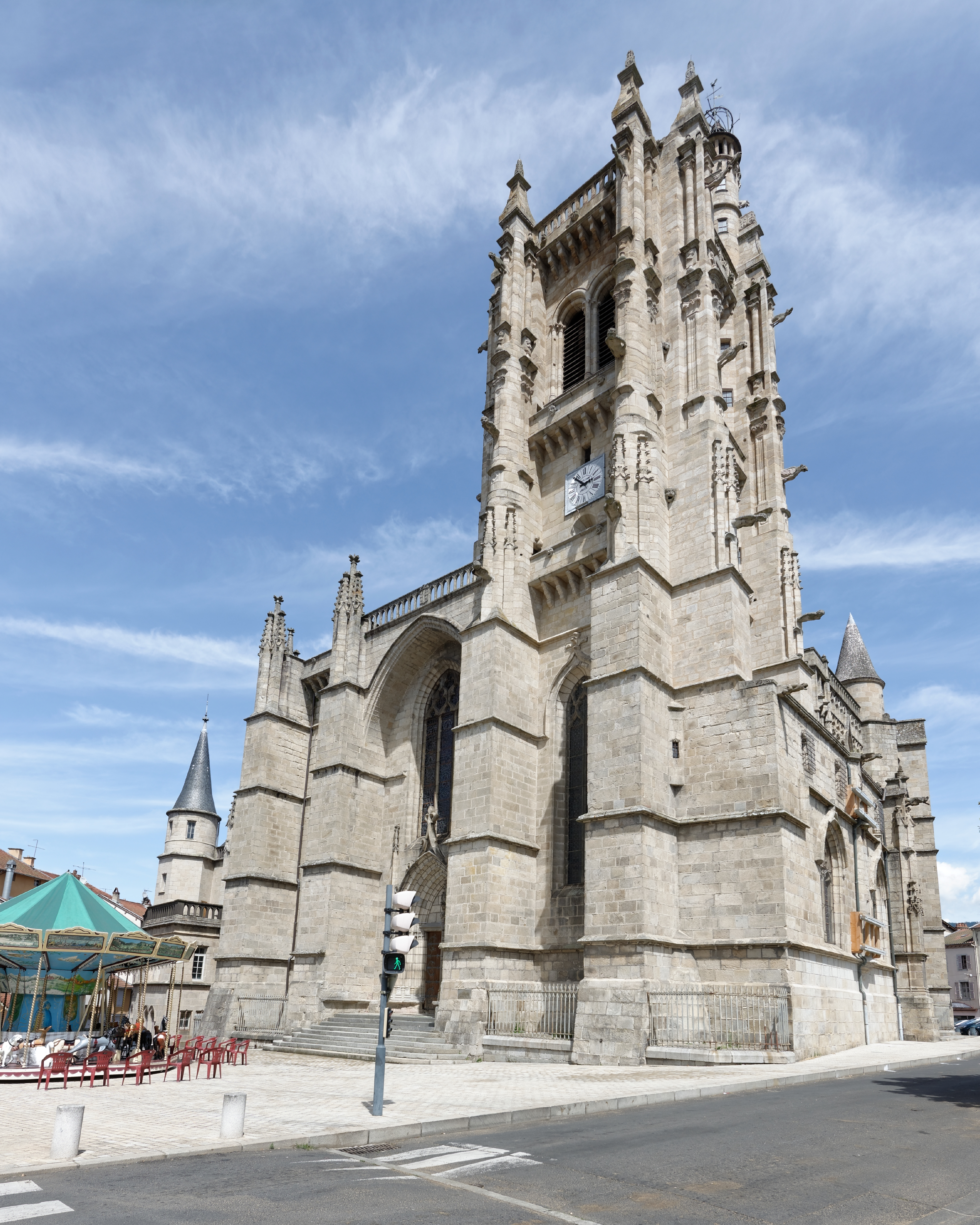 Façade de l'église Saint-Jean d'Ambert, Puy-de-Dôme.